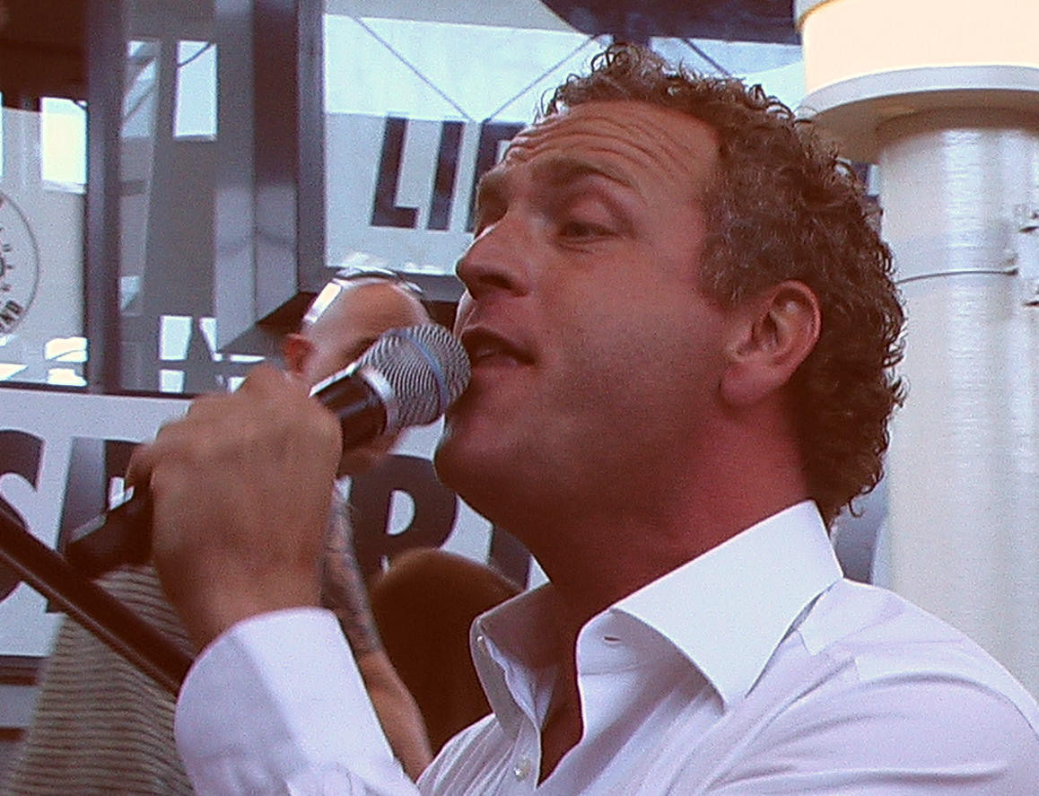 Gordon, dutch singer